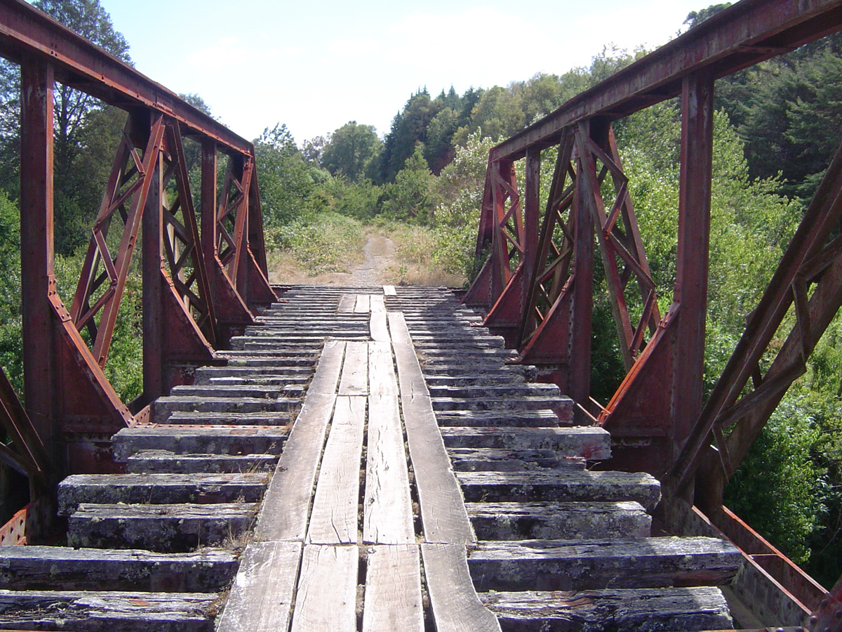 Puente Ferroviario Rio Ignao, Chile